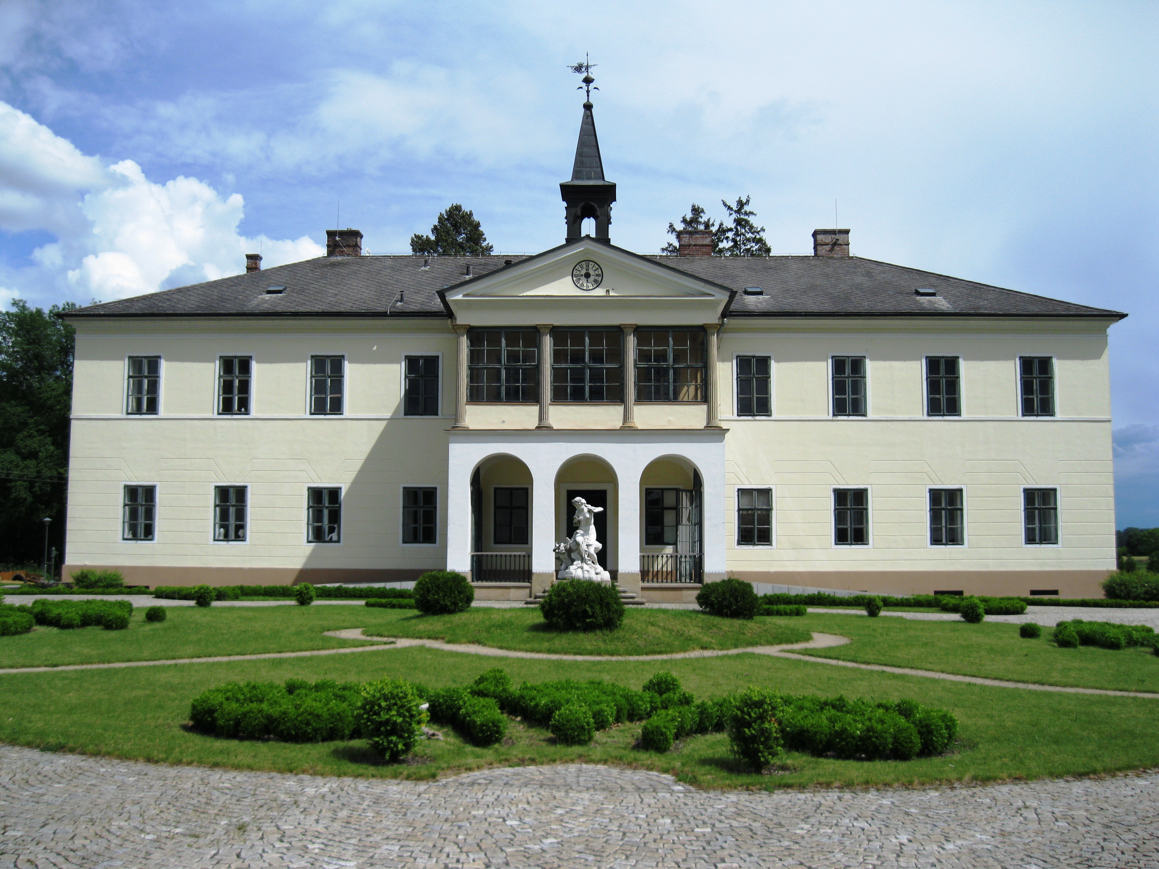 Zámek Citov, Citov 14